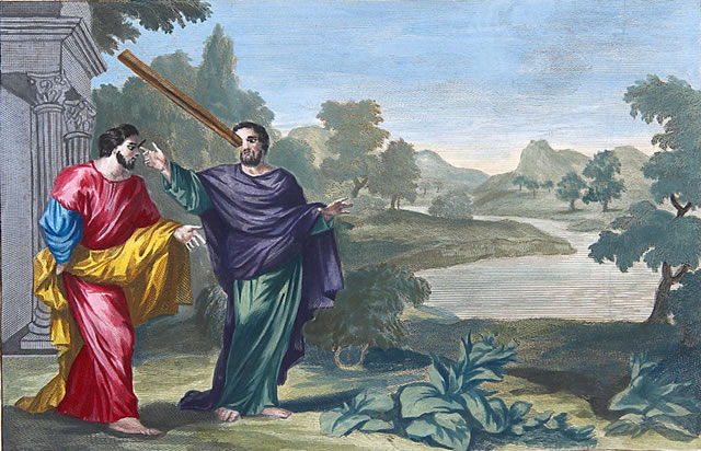 prent uit de Mortierbijbel, uitgegeven door Pieter Mortier omstreeks 1700: de balk en de splinter Mattheüs